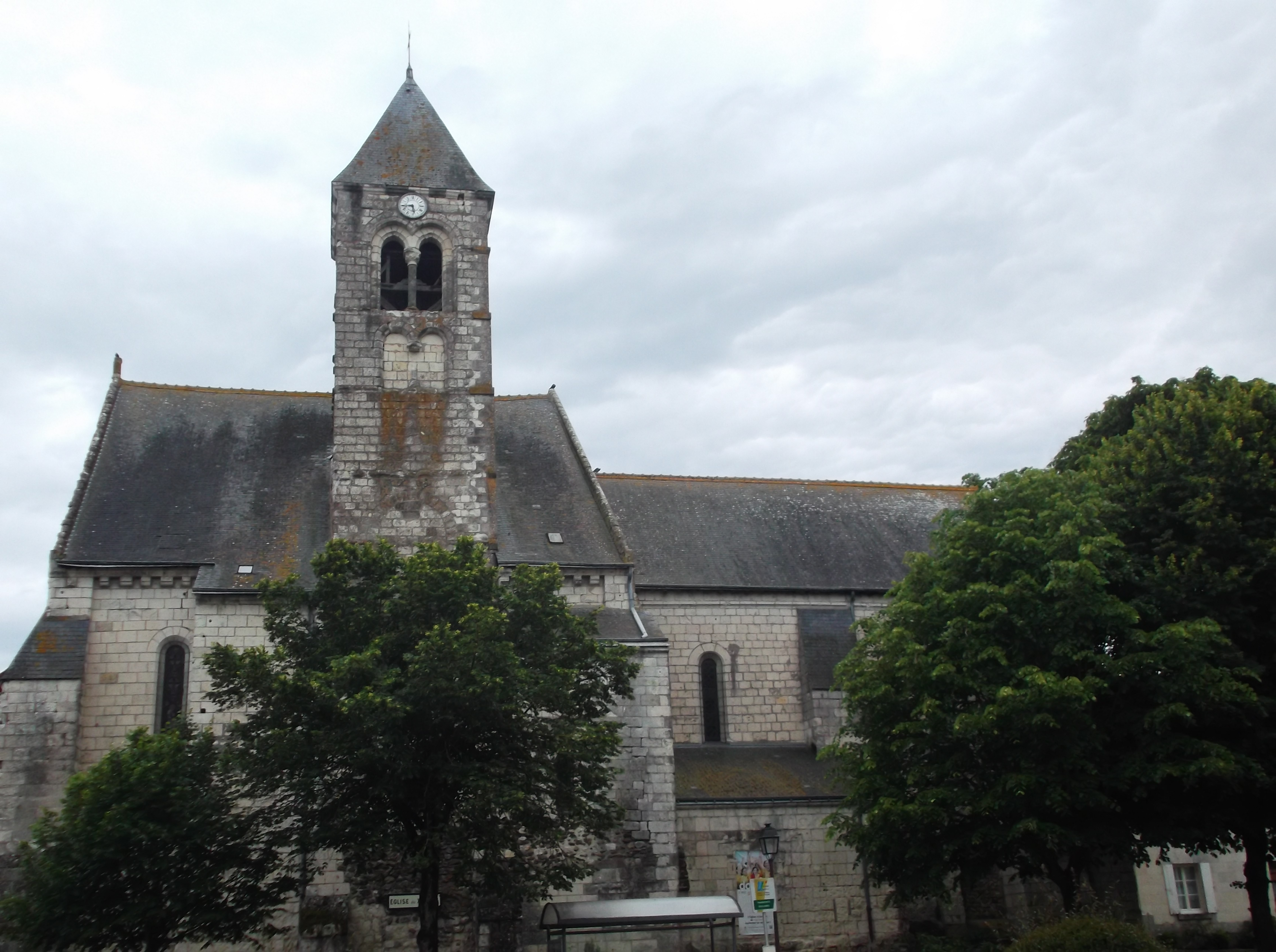 Eglise de SepmesEsperanto: kirko Notre-Dame-de-Sepmes